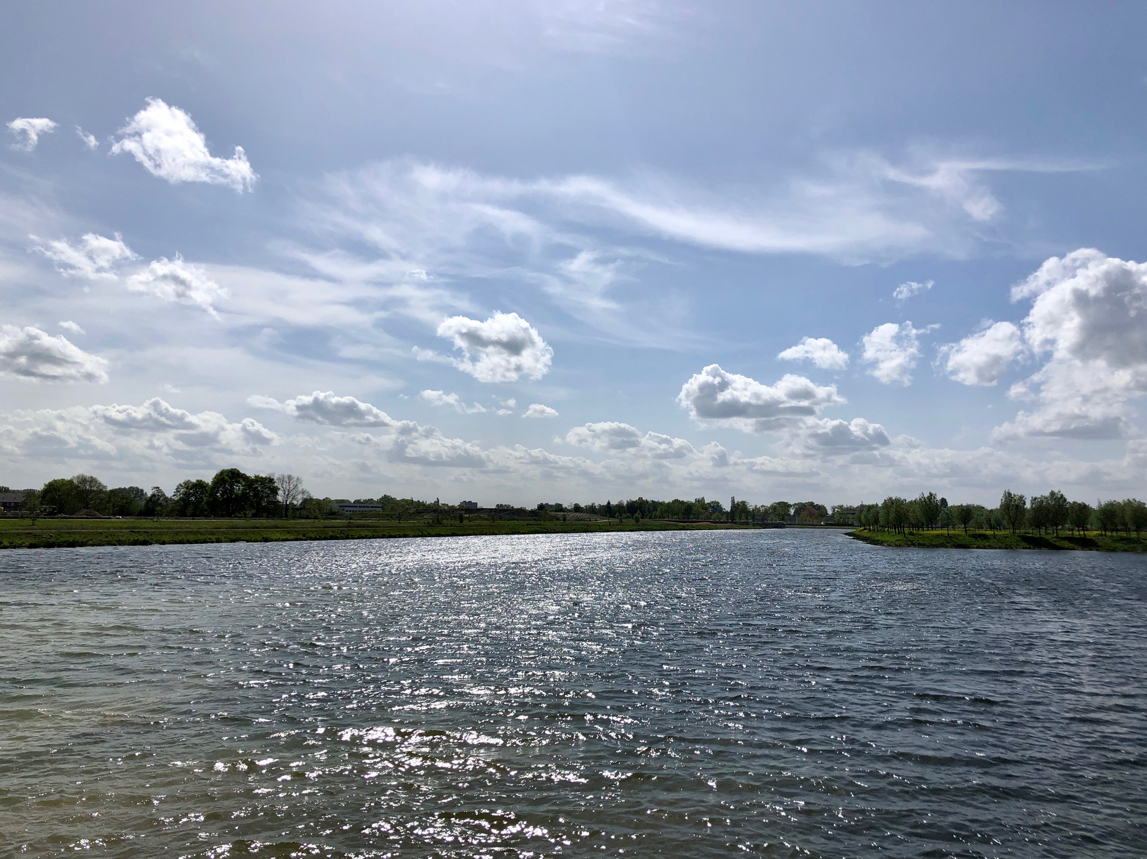 Ecoproject Waterakkers ten Zuidwesten van Teteringen